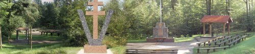 Assemblage de Photos du site du Maquis du Haut du Bois